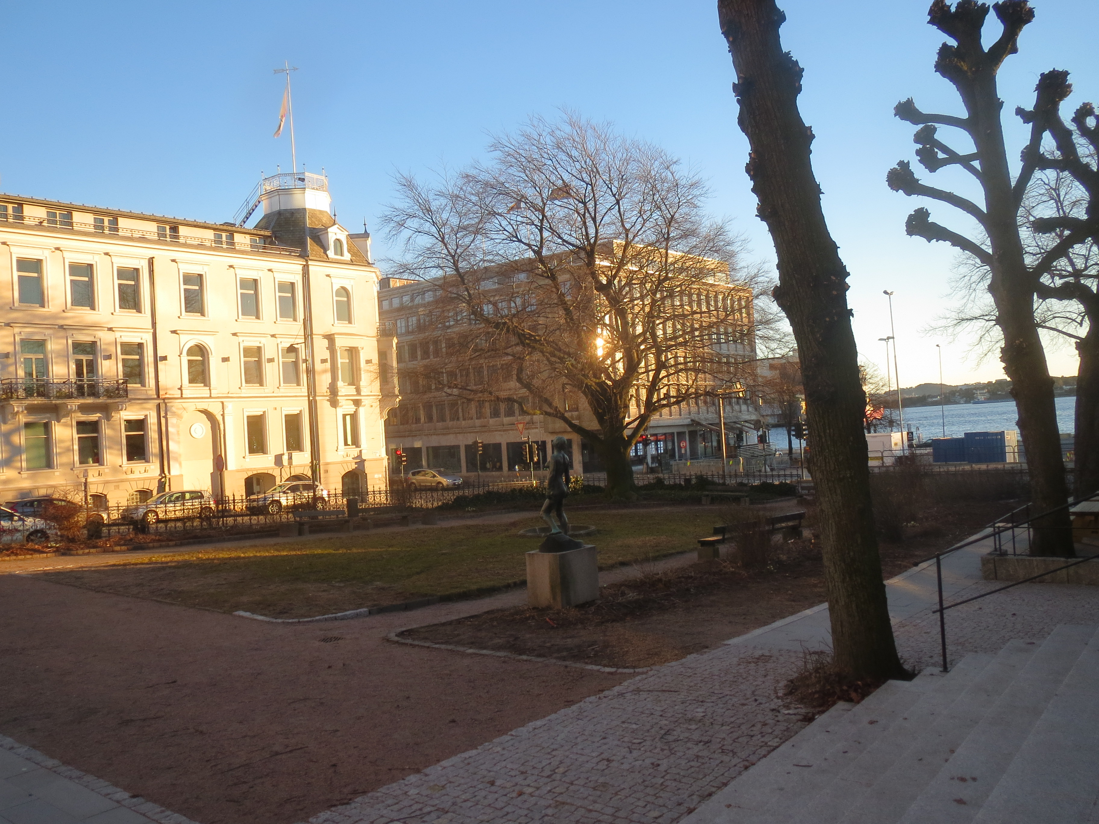 Børsparken i Kristiansand